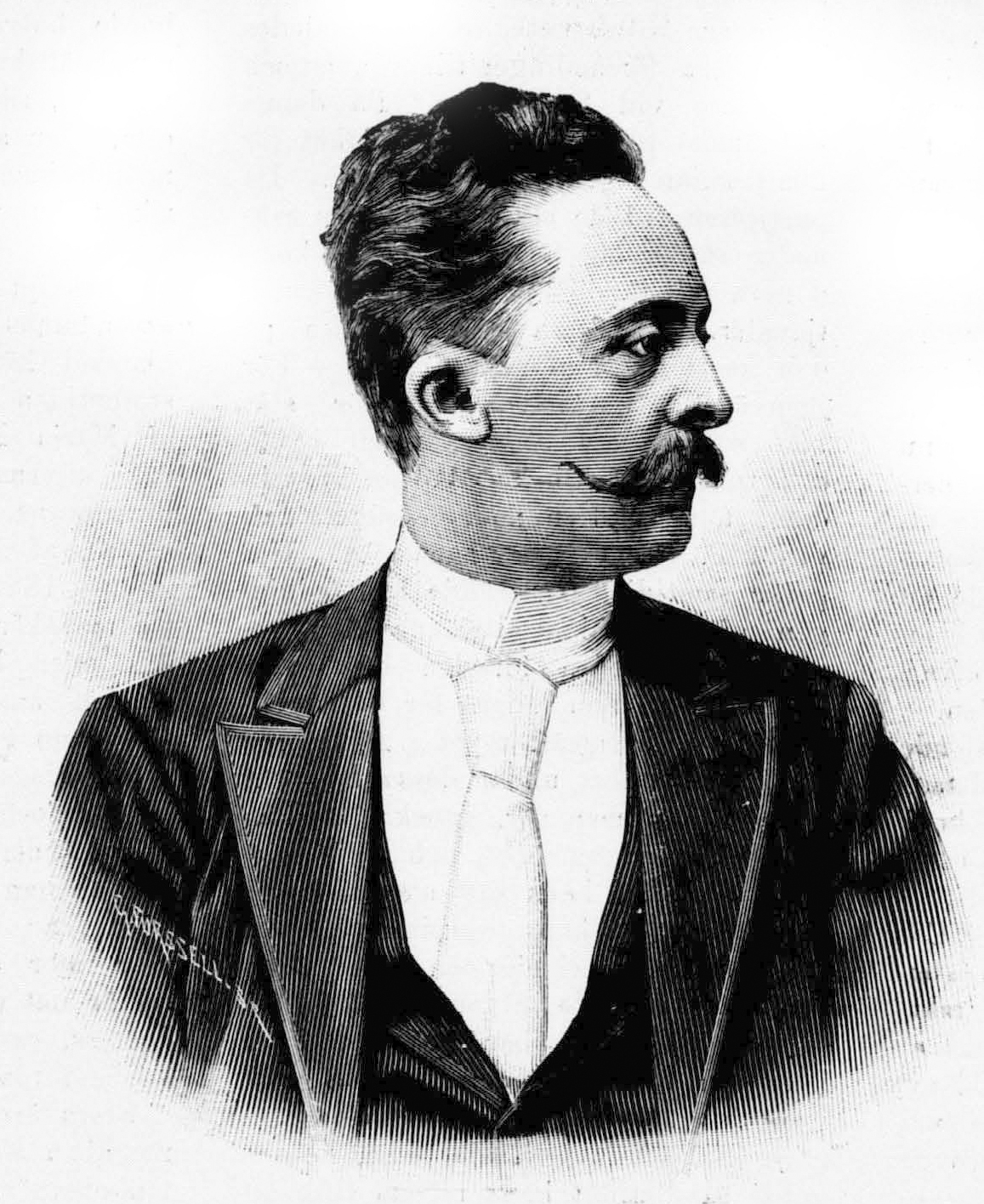 Erik Åkerberg (1860-1938)